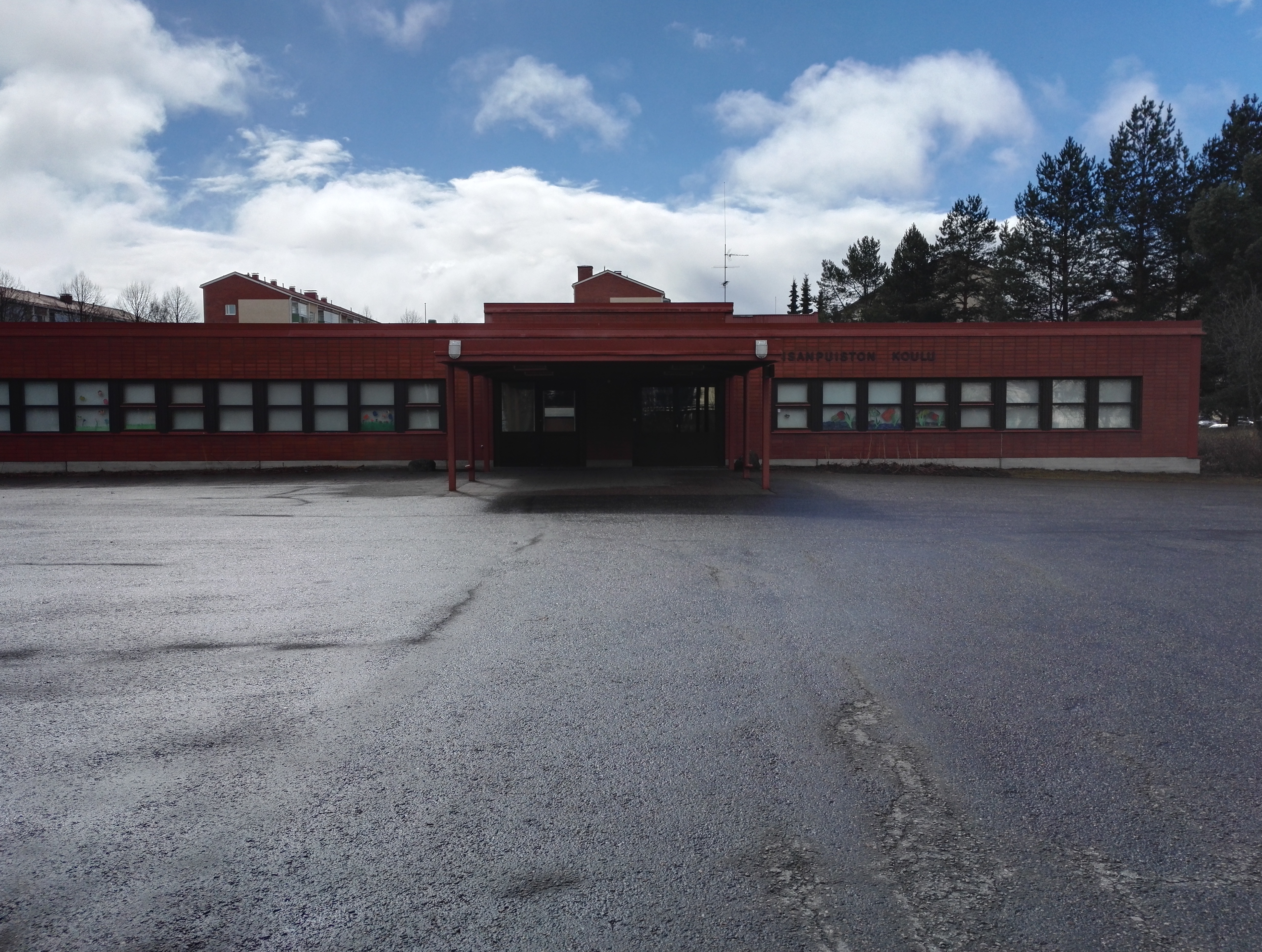 Puistokoulun Liisanpuiston koulutalo Tampereen Kalevassa